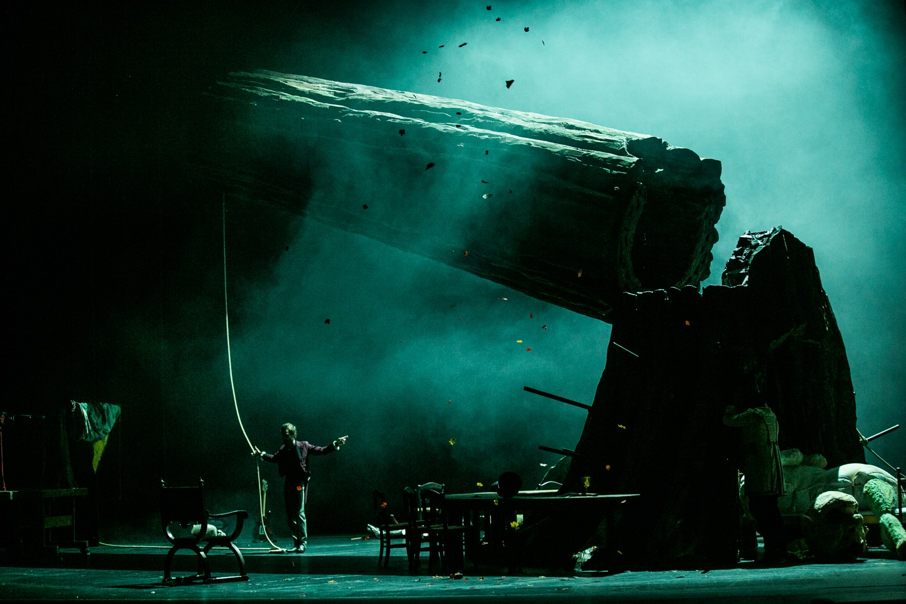 Ensemblemitglied Benedikt Greiner in der Inszenierung Merlin am Schauspielhaus Graz